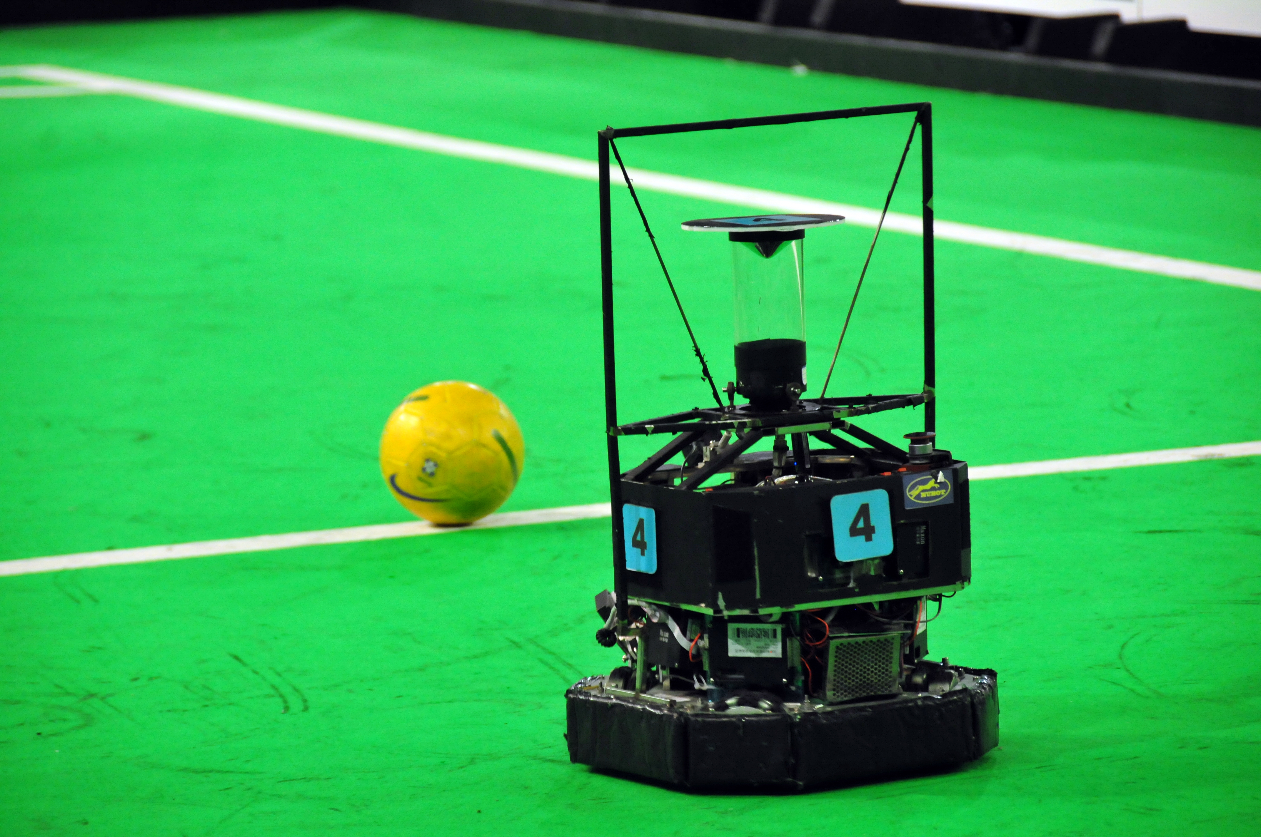 Eindhoven, Niederlande, Robocup 2013